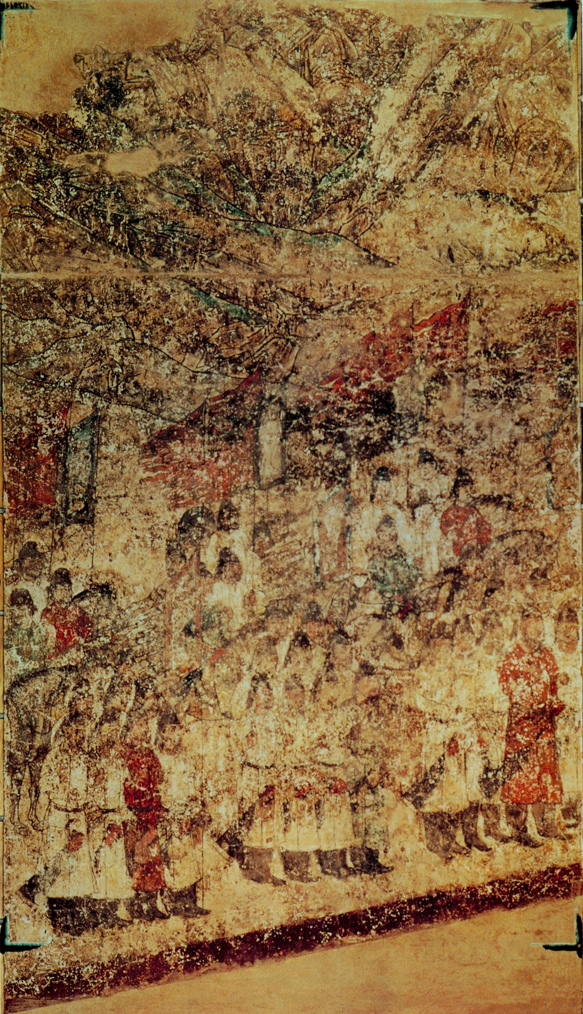 Гвардия почета. Роспись стены гробницы принца Идэ. Цяньсиань, провинция Шаньси.